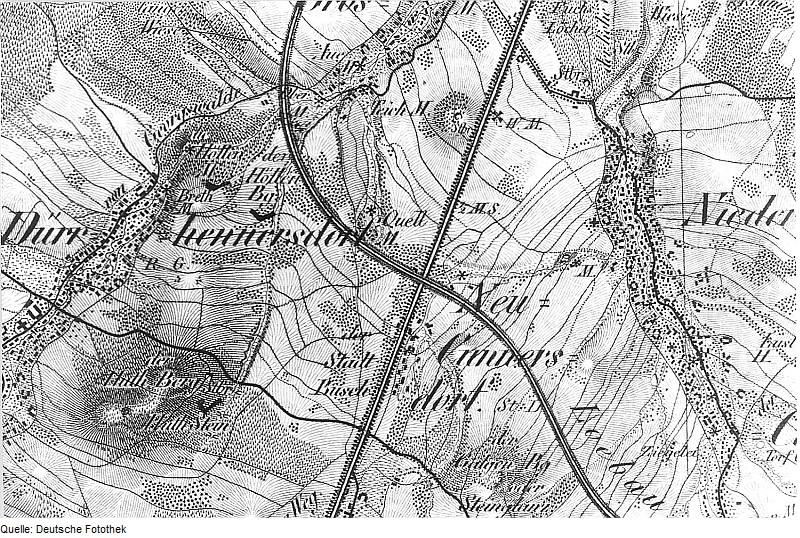 Original image description from the Deutsche Fotothek Dürrhennersdorf. Oberreit, Sect. Zittau, 1844/46